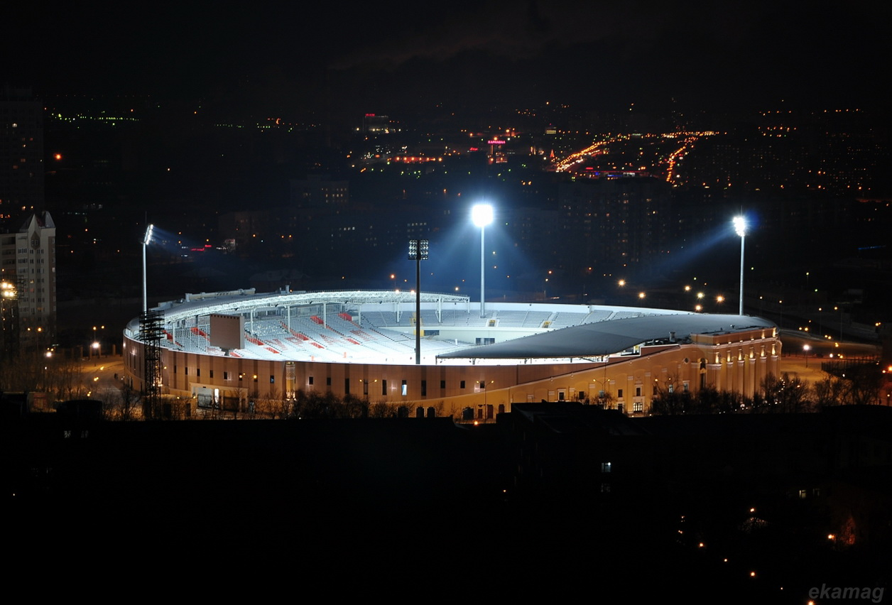 Центральный стадион в Екатеринбурге